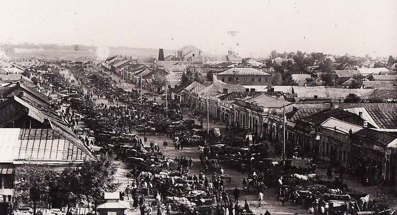 Базар, Бендеры, 1938 год